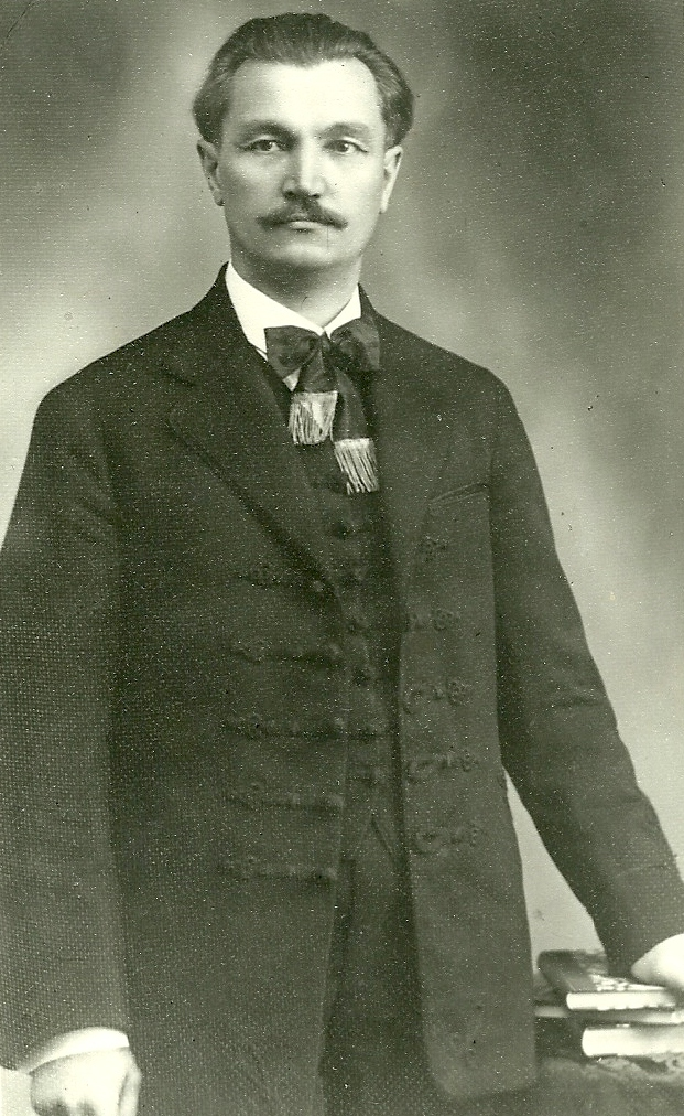 Dorosmai János, magyar költő